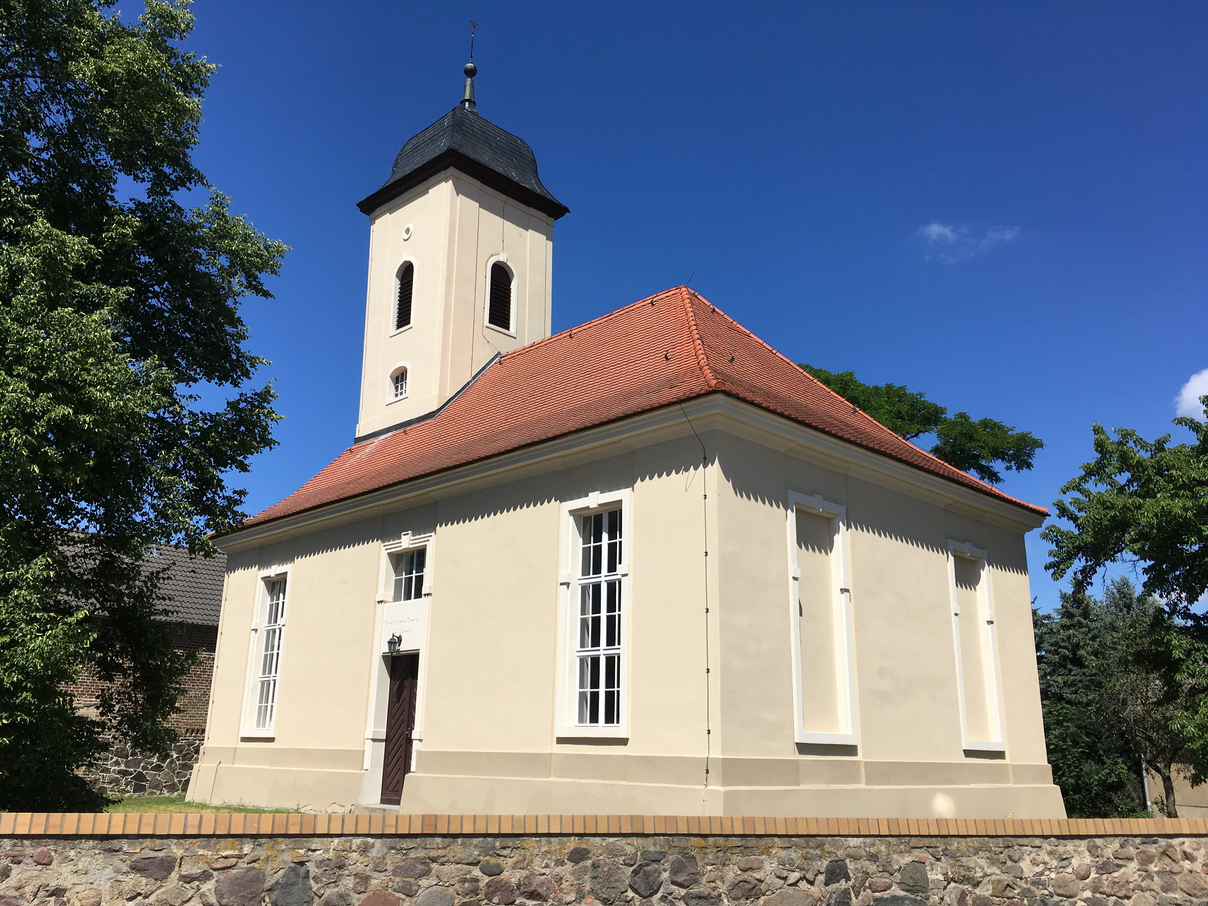 Die Dorfkirche in Schünow, Stadt Zossen in Brandenburg, ist eine Saalkirche aus dem Jahr 1765 bis 1767. Im Innern ist ein Kanzelaltar aus der Bauzeit.